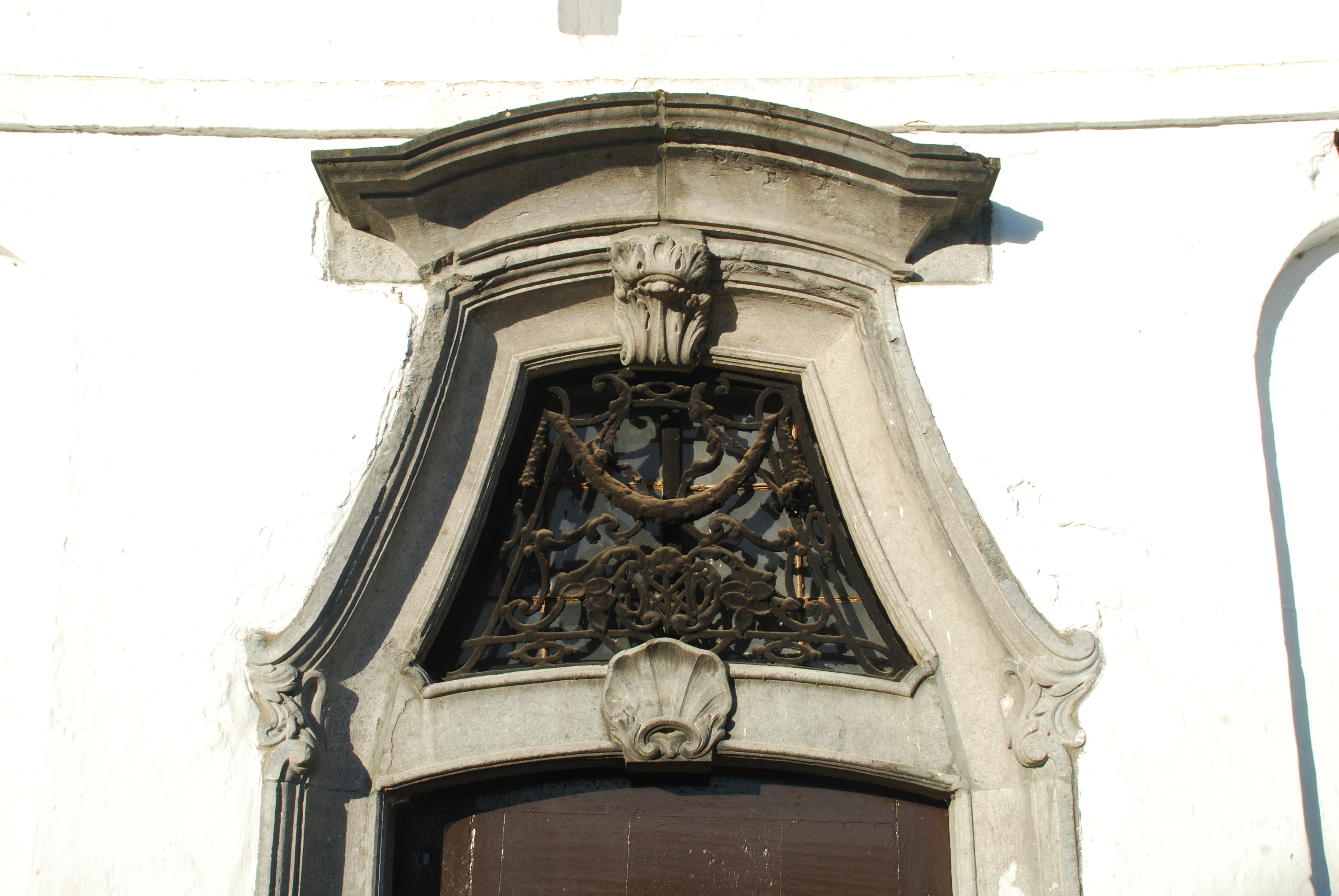 Belgique - Brabant wallon - Chapelle Notre-Dame des Affligés de Ways